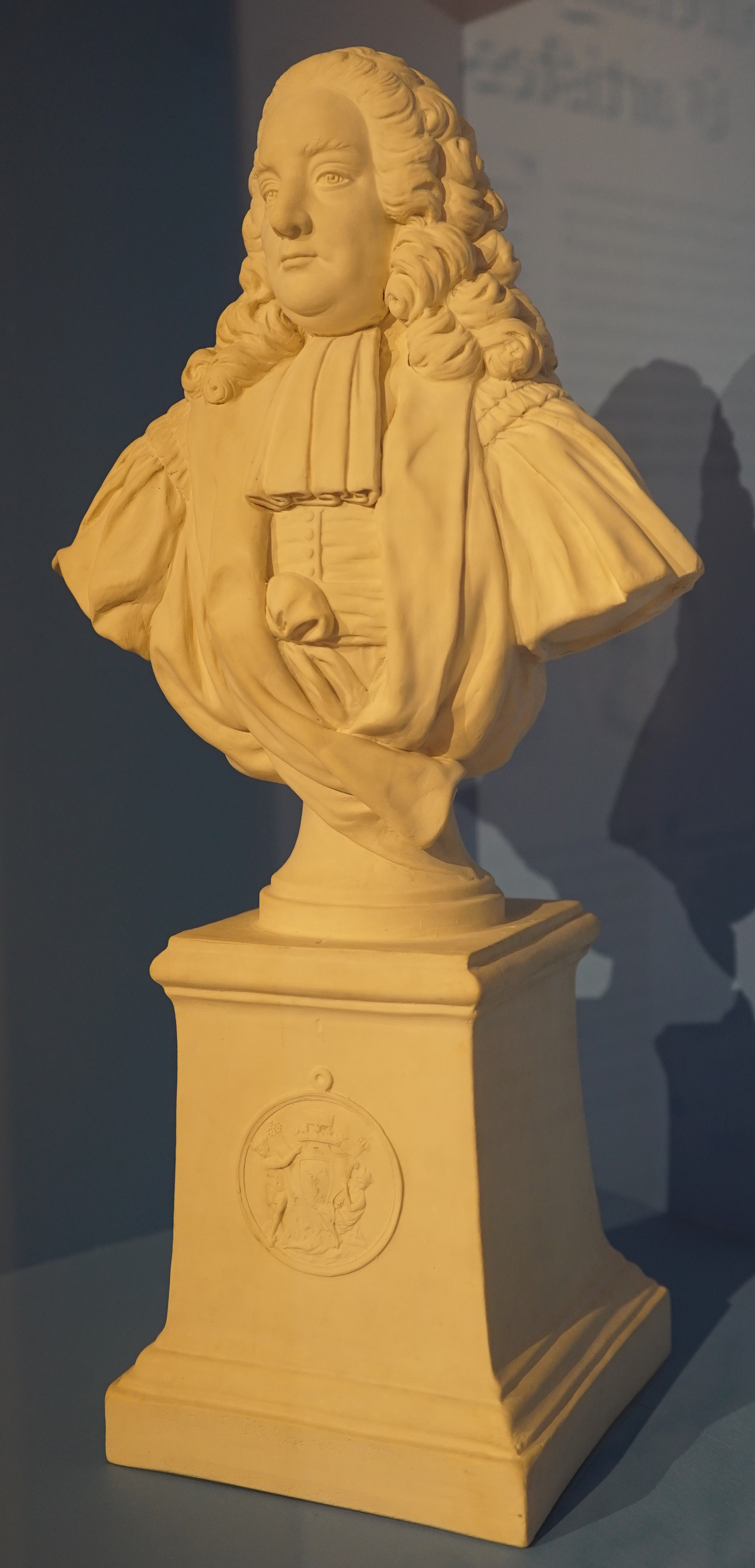 présenté lors d'une exposition temporaire au musée de Commercy.